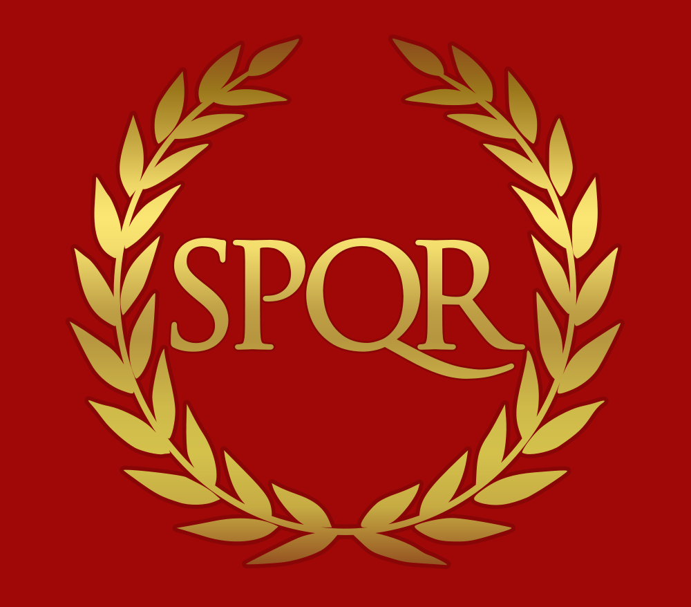 Вексиллоид Римской империи